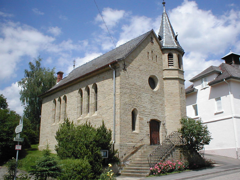 Kirche in Neckarbischofsheim-Helmhof, erbaut 1892